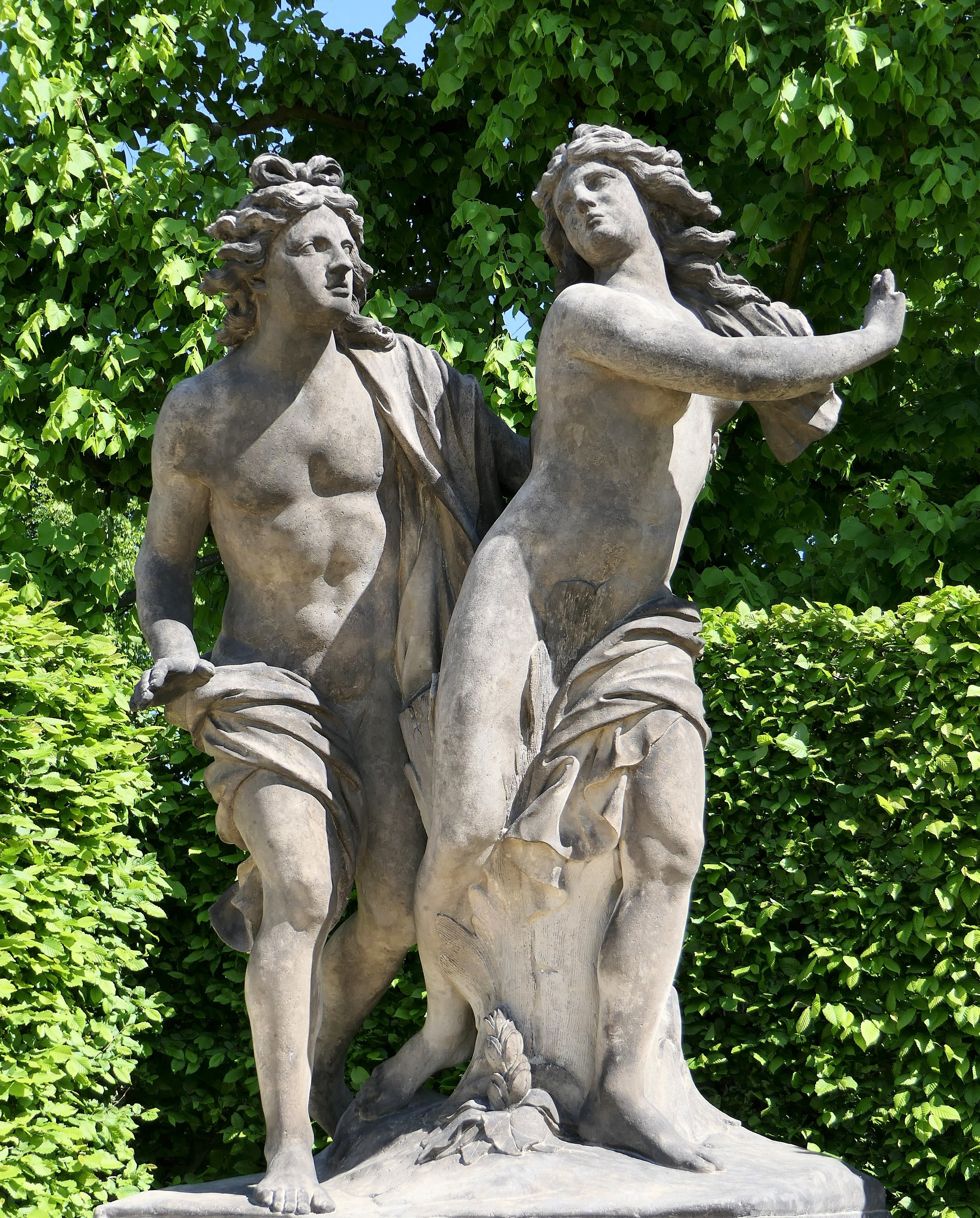 Apollo and Daphne - Skulptur im Barockgarten Großsednitz (Doppelfiguren zu 8 Liebespaaren der Mythologie, die dem Bildhauer Johann Benjamin Thomaes zugeschrieben werden)